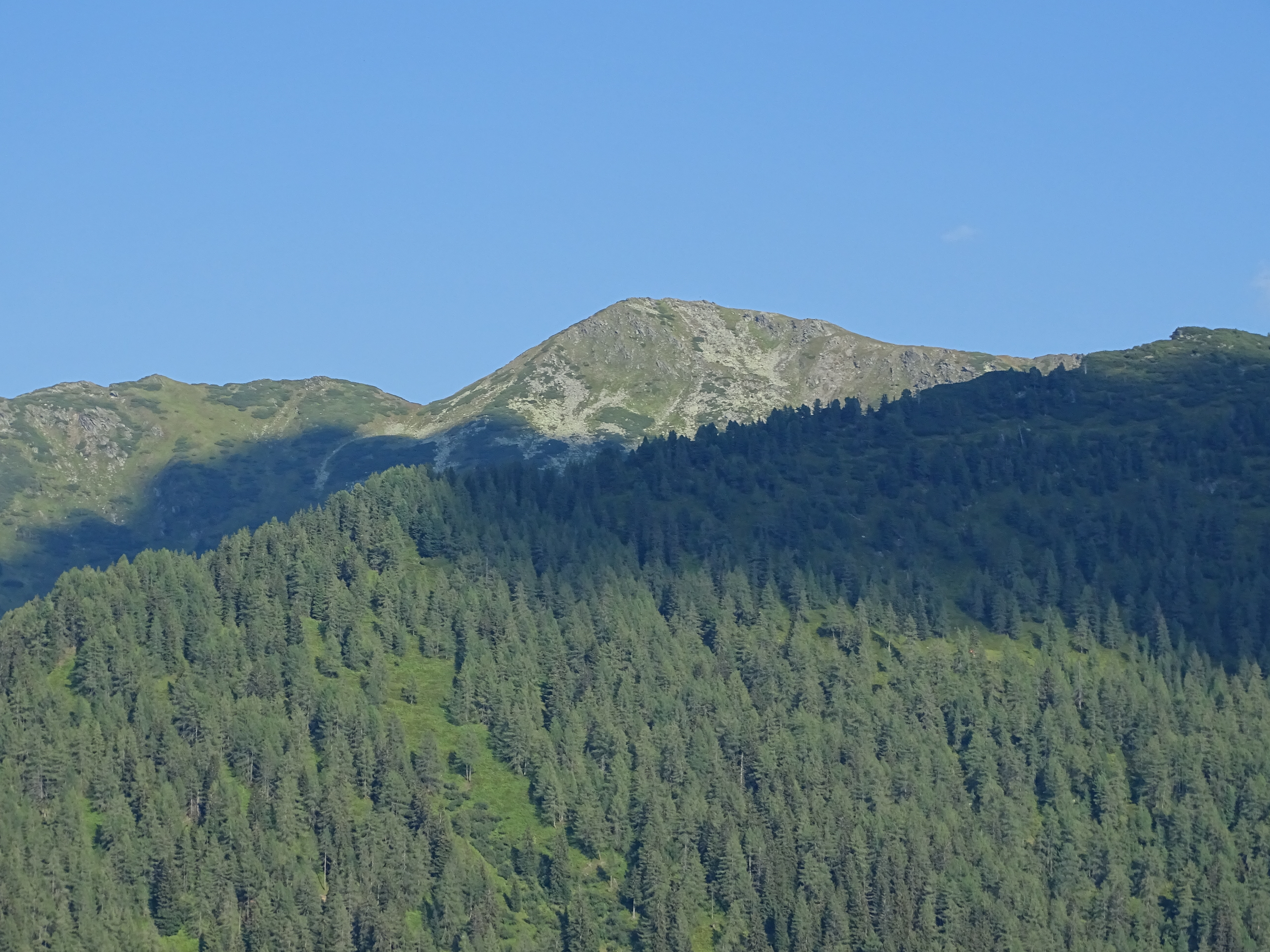 Die Seekoppe an der Gemeindegrenze von Aigen im Ennstal und Rottenmann.